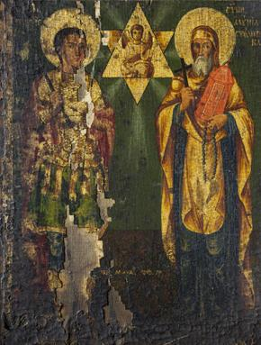 Св. Ѓорѓи и св. Алимпиј Столпник, црква Св. Никола, Тетово. 1863 година. Автор неидентификуван. Дим: 35,5 Х 27 Х 2,5 см.